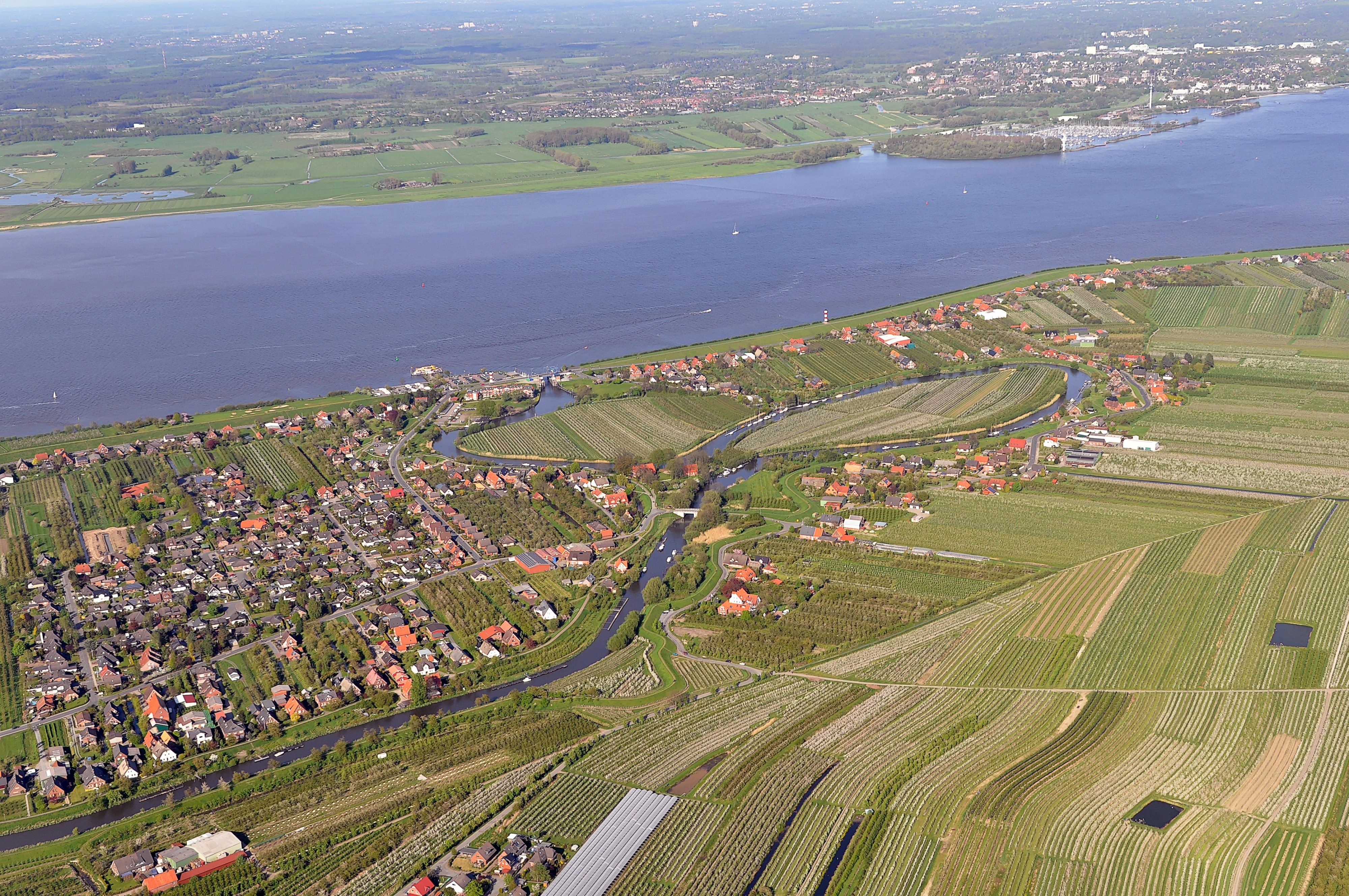 Luftbilder von der Nordseeküste 2012-05